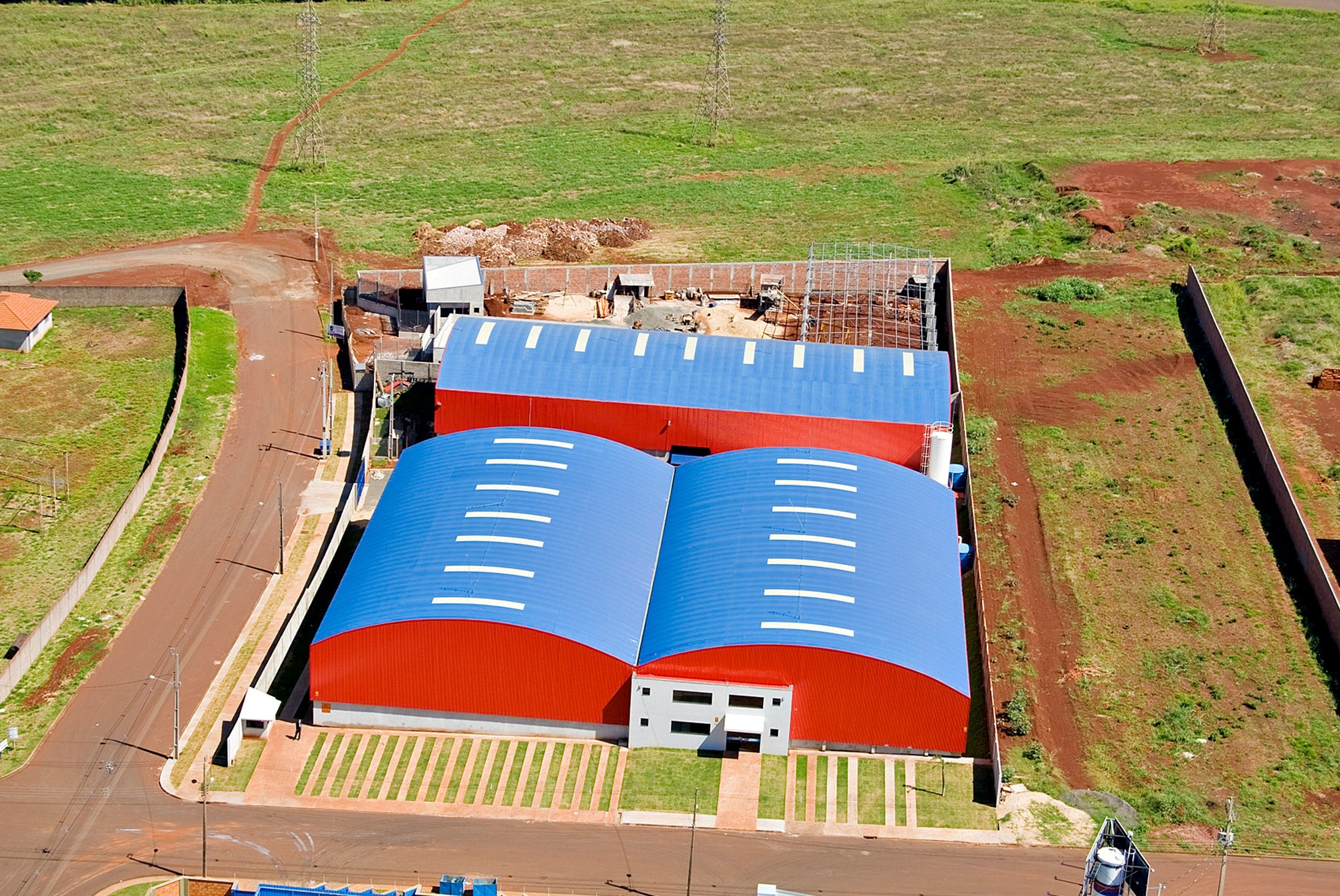 Vista de las instalaciones de Ingá Alumínios Ltda. Área total de 3400 M2